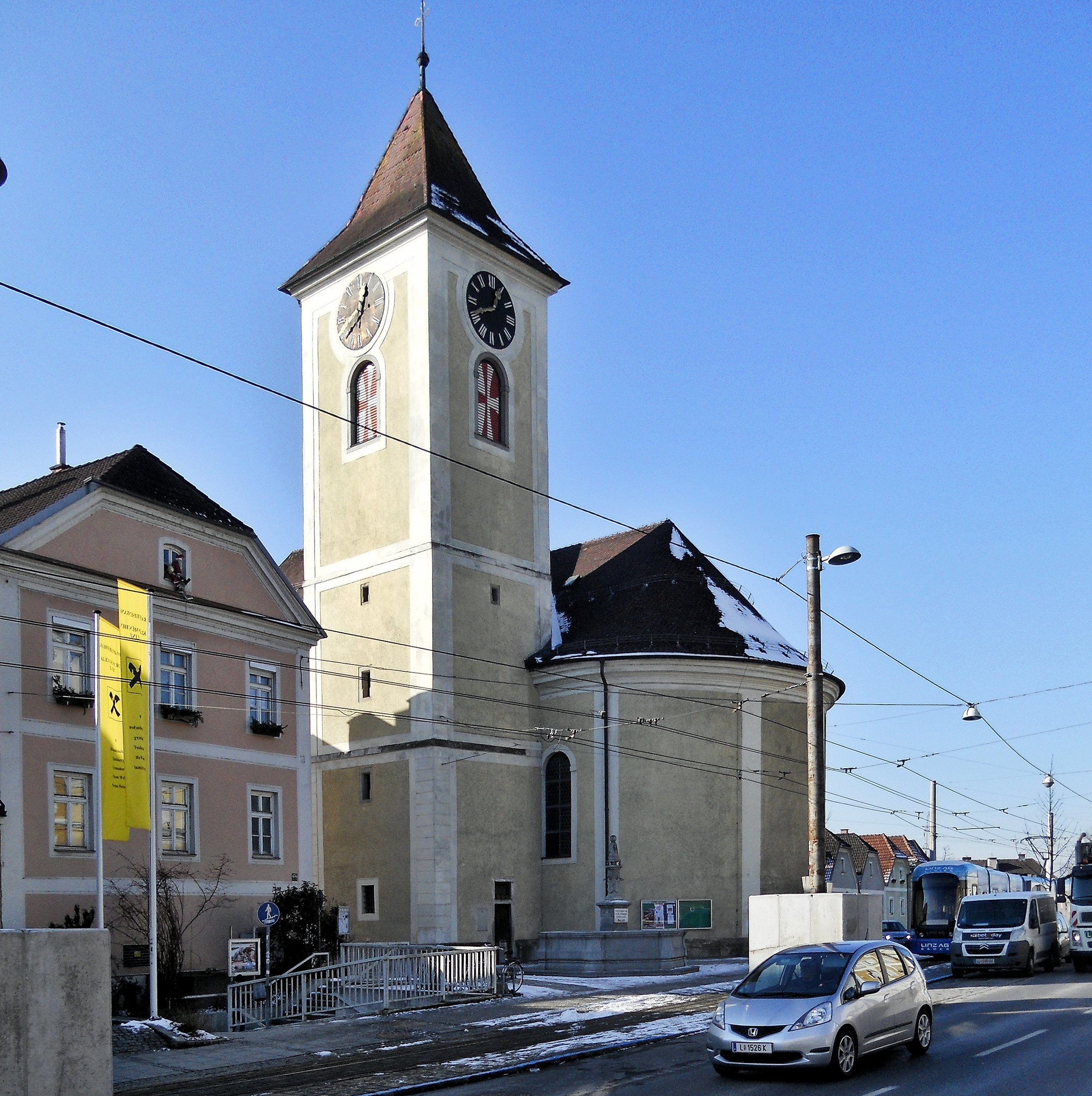 Kath. Pfarrkirche hl. Johannes der Täufer und ehem. Friedhof